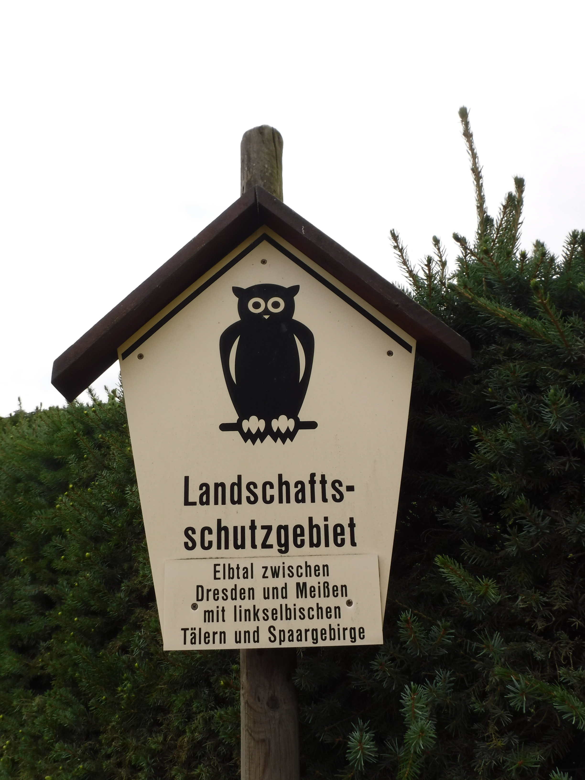 Tafel zum Landschaftsschutzgebiet "Elbtal zwischen Dresden und Meißen mit linkselbischen Tälern und Spaargebirge" in Zaschendorf (Meißen)